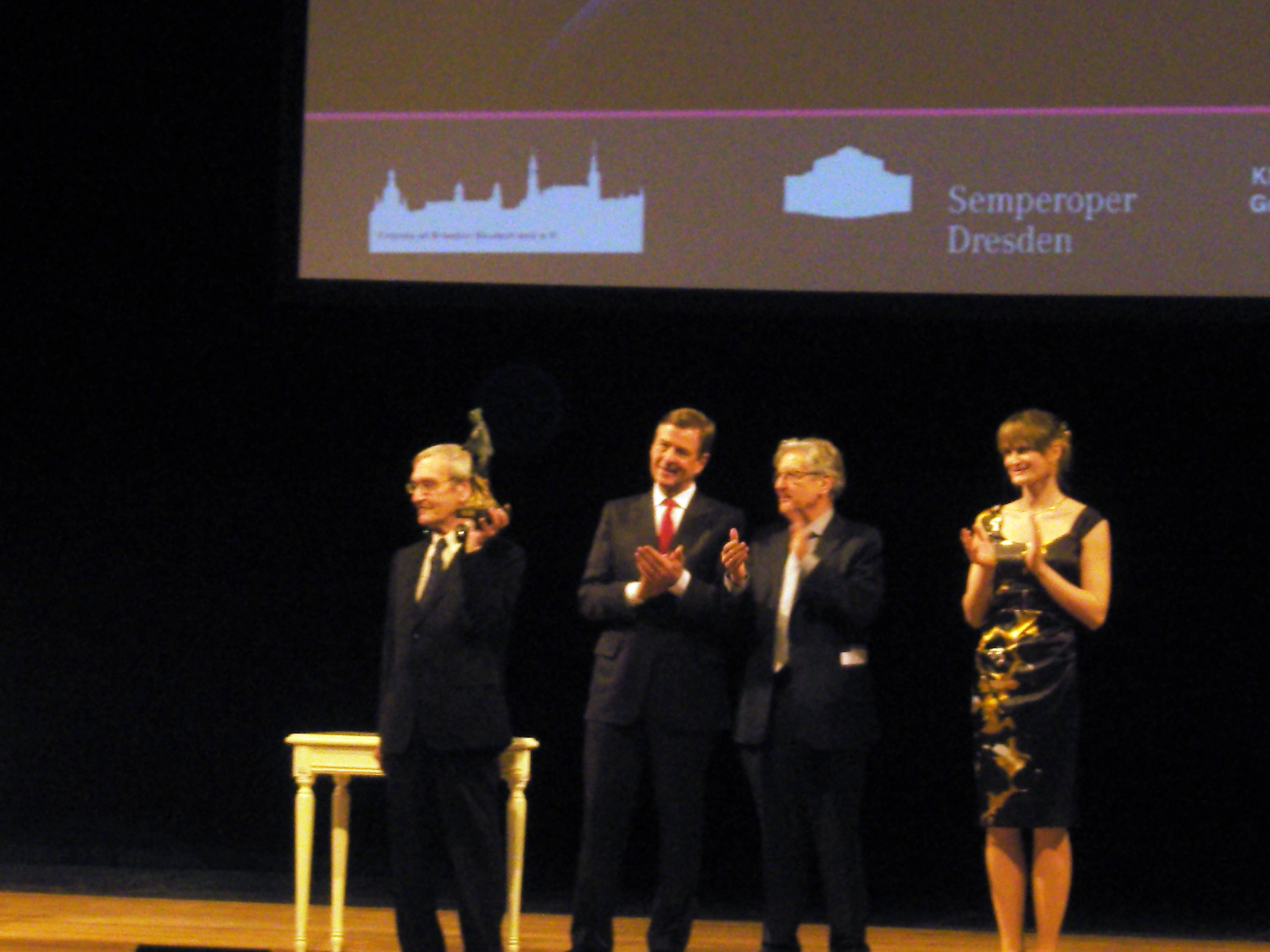 Stanislaw Jewgrafowitsch Petrow bei der Verleihung des Dresden-Preis in der Semperoper; Februar 2013 (2. von links: Laudator Claus Kleber; Mitte: Gerhart Baum; rechts: Kristin Alschner)